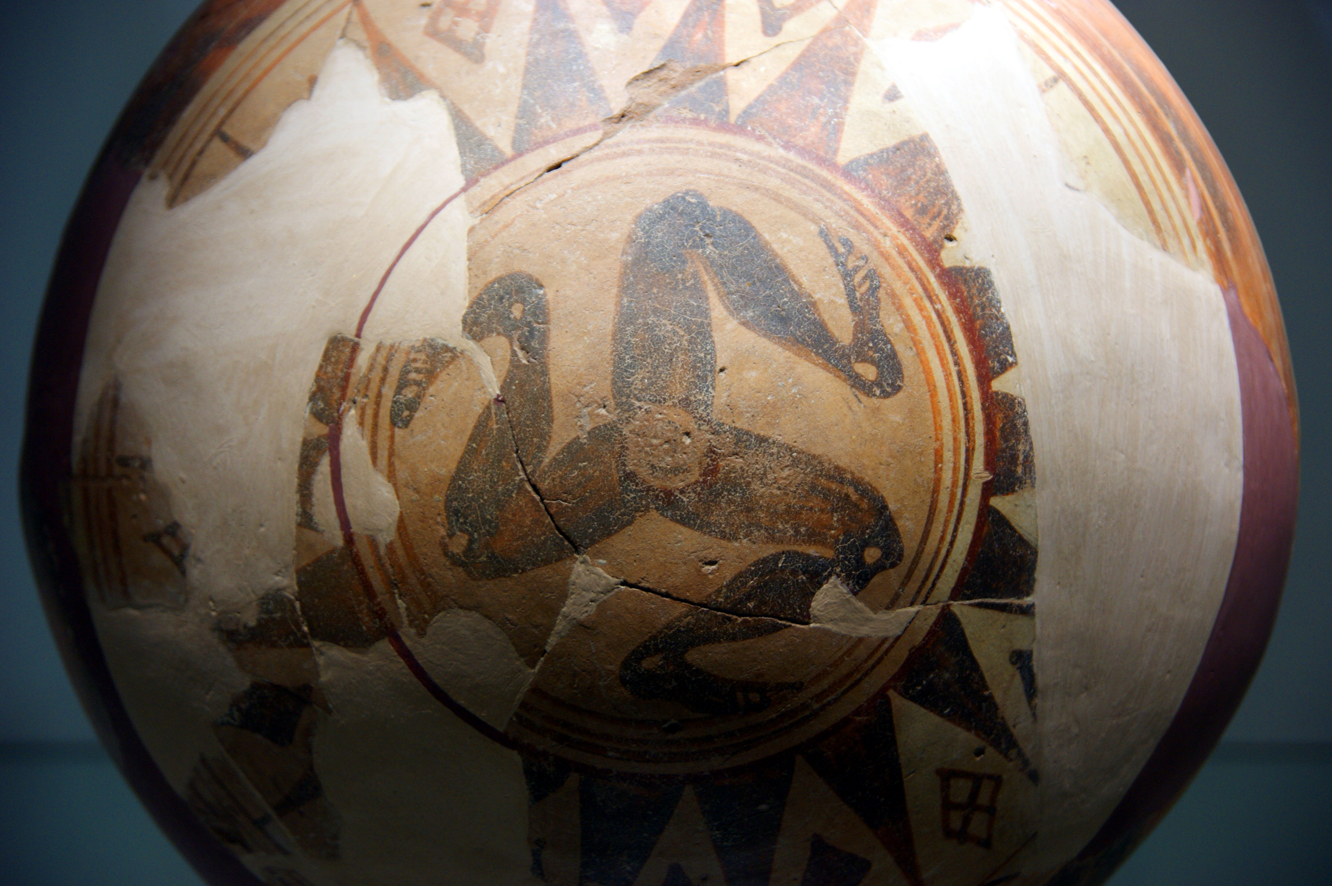 2009-03-22 03-29 Sizilien 683 Agrigent, Parco Valle dei Templi Agrigento, Museo Archaeologico